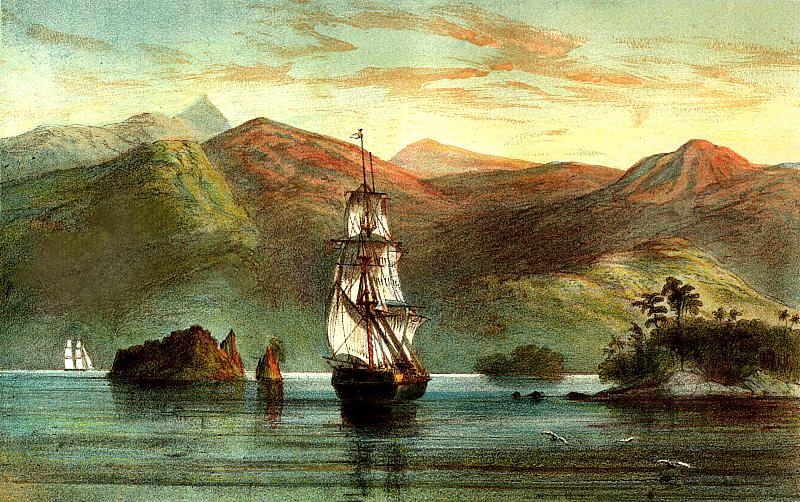 Gezigt aan de Westkust van Sumatra